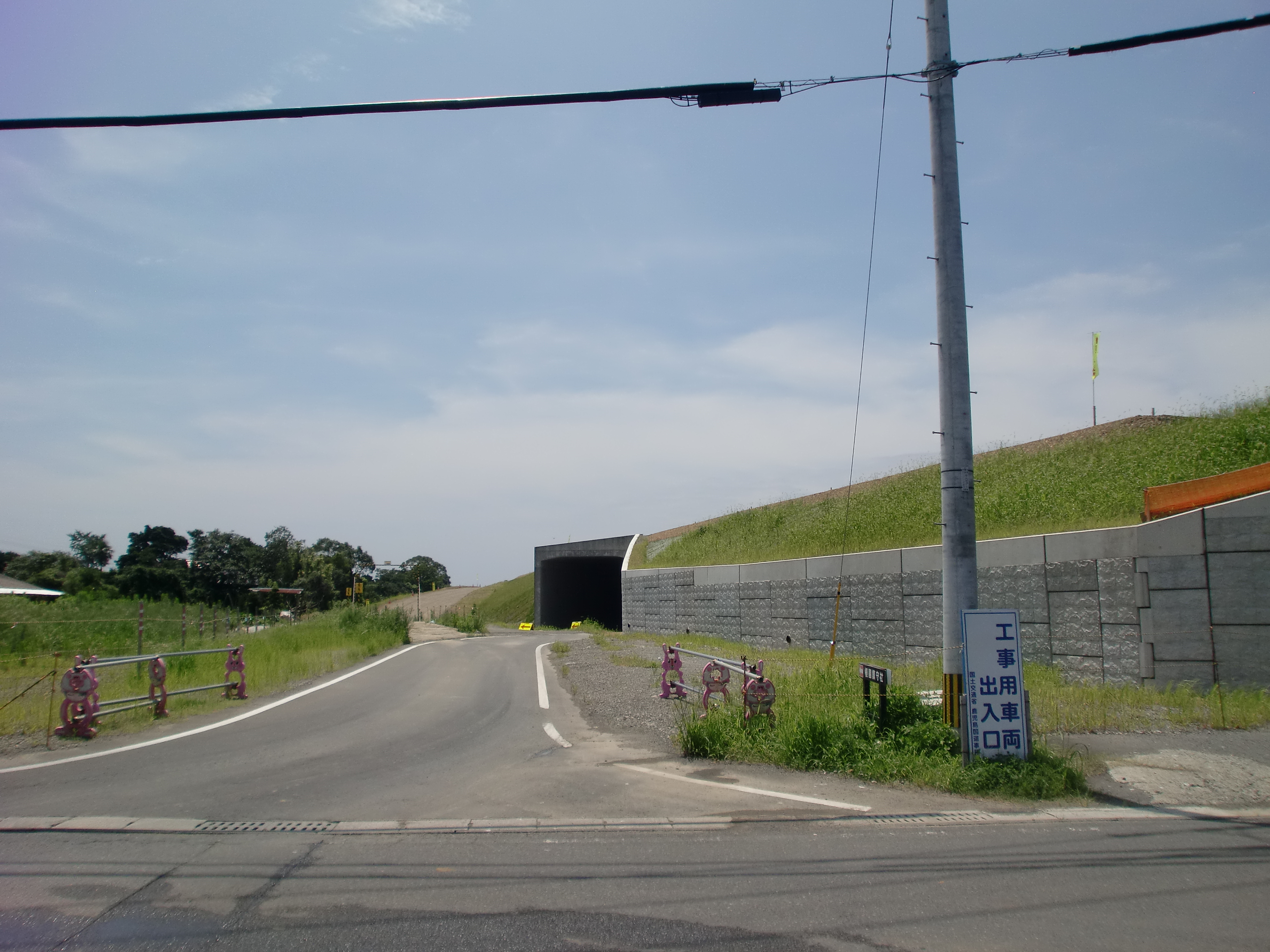 建設中の高尾野インターチェンジの鹿児島方面ランプ